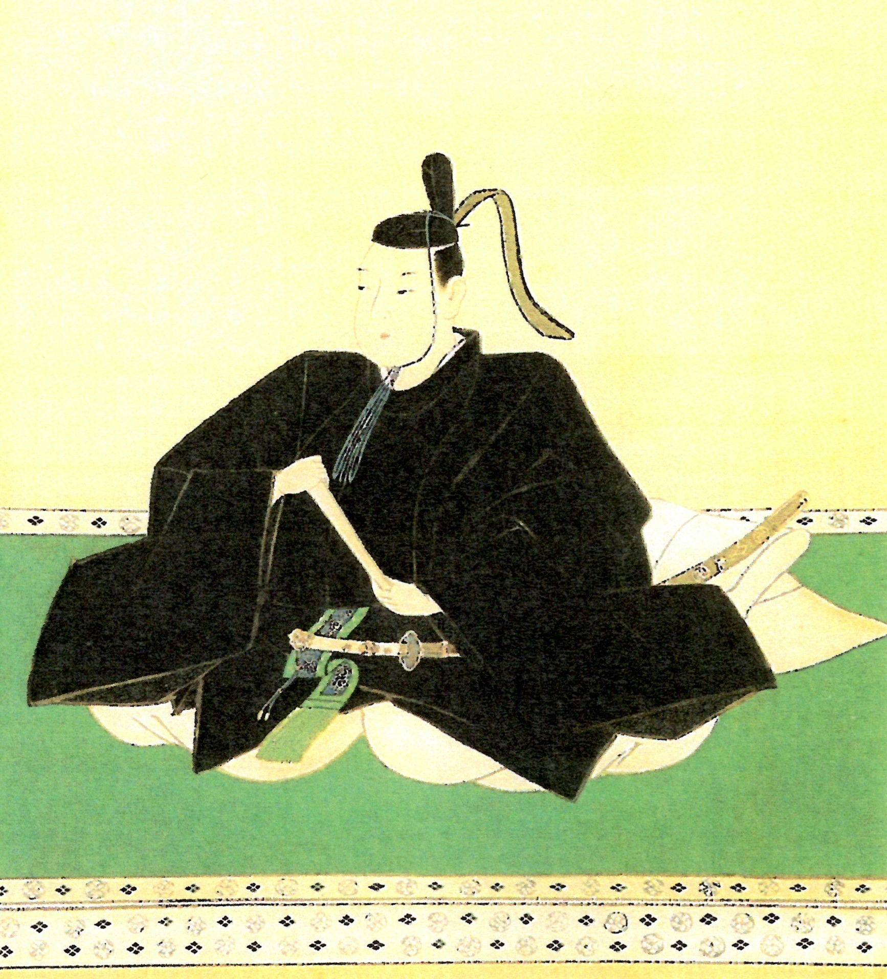 蜂須賀宗員の肖像。